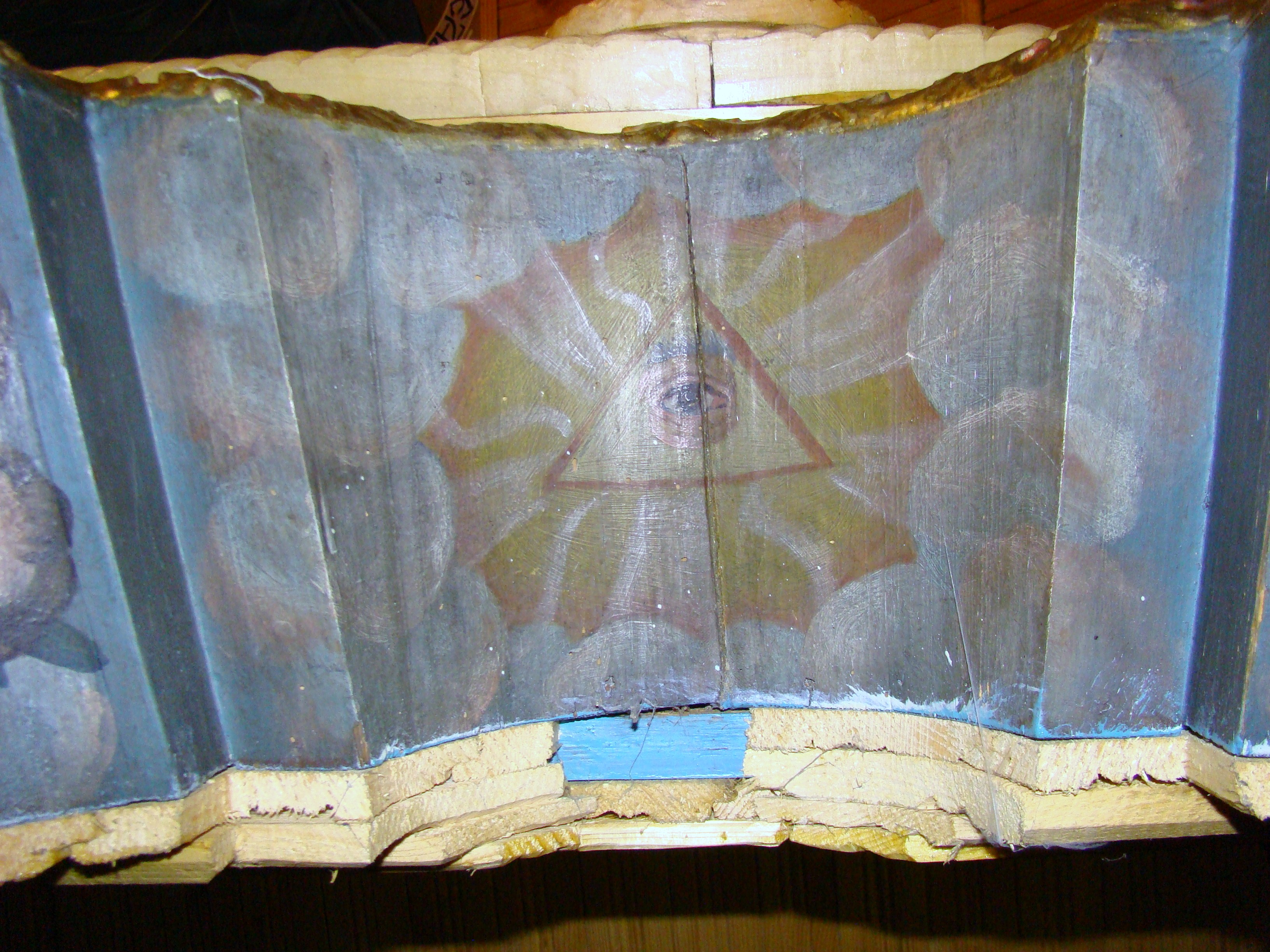 Biserica de lemn "Cuvioasa Paraschiva", sat IZVOARELE; comuna CERNEŞTI